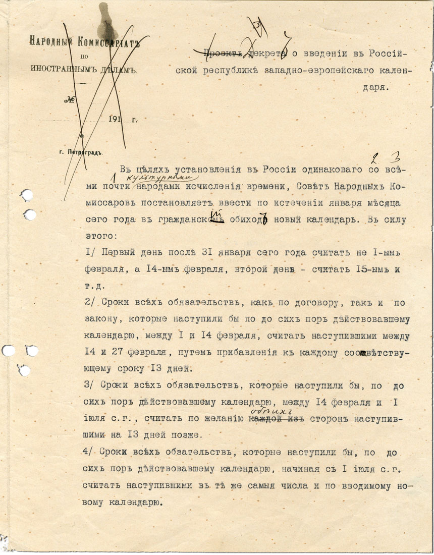 Dekreet Lääne-Euroopa kalendri kehtestamisest Venemaa Vabariigis (lk 1(2))